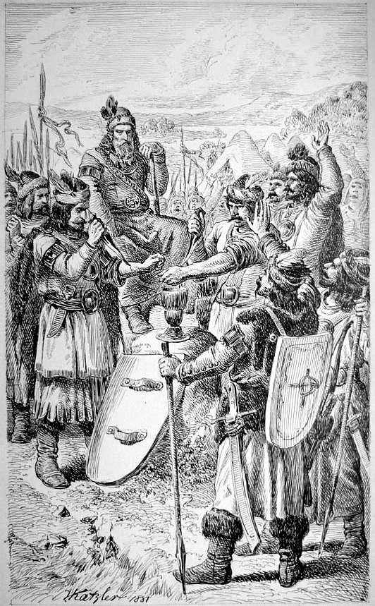 Vinzenz Katzler: Vérszerződés